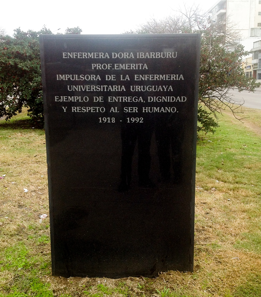 Monumento de homenaje a la Nurse Dora Ibarburu, situado en el cantero central de Av. Italia, frente al Hospital de Clínicas "Dr. Manuel Quintela", Montevideo, Uruguay